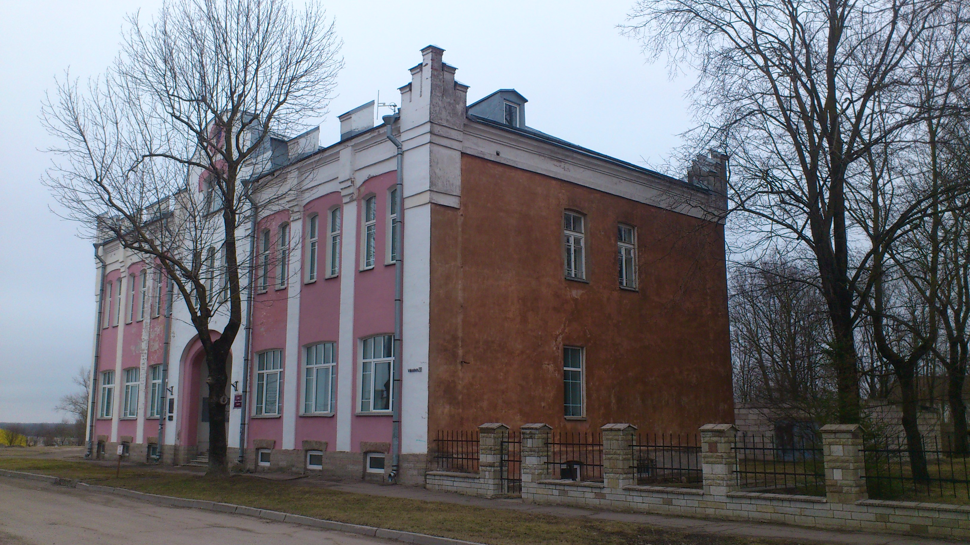 Hoone aadressil Vabaduse 20, Narva